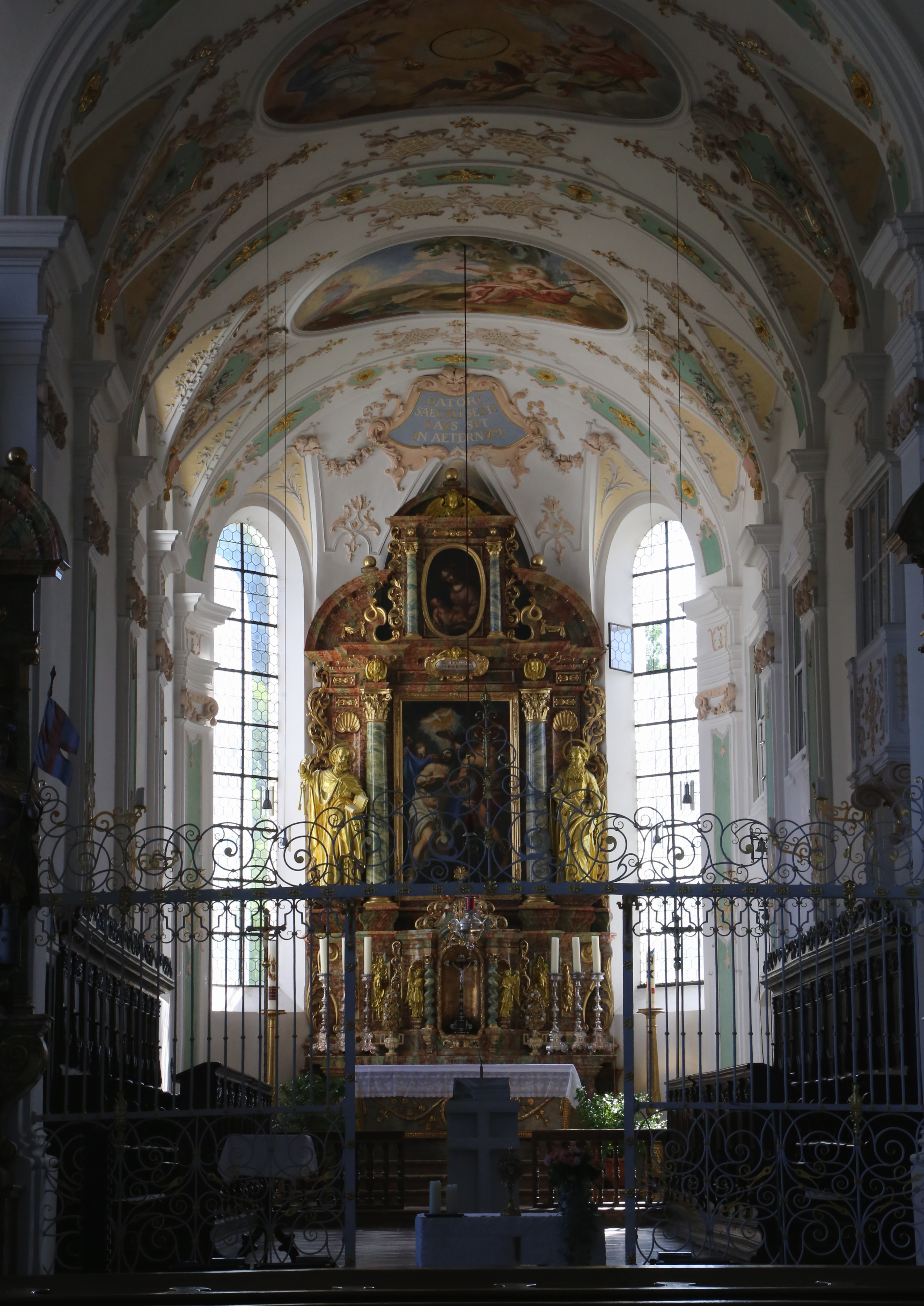 Maxlrainer Straße 11, Beyharting, Tuntenhausen; Ehemalige Augustinerchorherren-Stiftskirche, jetzt Pfarrkirche St. Johann Baptist, Saalbau mit Vorhalle, eingezogenem Langchor und Nordturm, Weihe des ersten Baues 1130, Chorneubau, Kreuzgang und Turm 1420/60, Langhausumbau zu einem einschiffigen Saalbau durch Constantin Pader 1668/70, 1730 barocke Ausgestaltung des Inneren; mit Ausstattung.